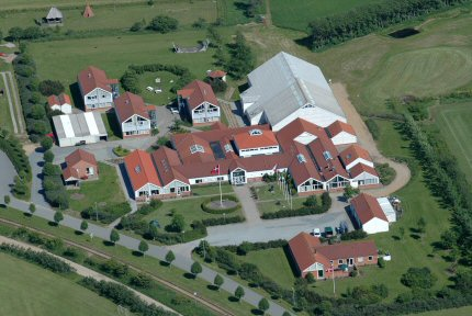 Skals Efterskole set fra luften. De tre elevhuse ses øverst til venstre i billedet.